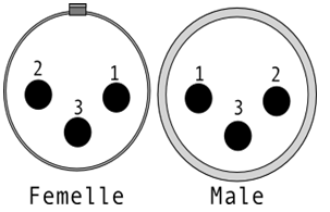 Brochage XLR